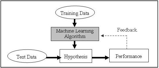 ลักษณะการเรียนรู้ของเครื่องจักร